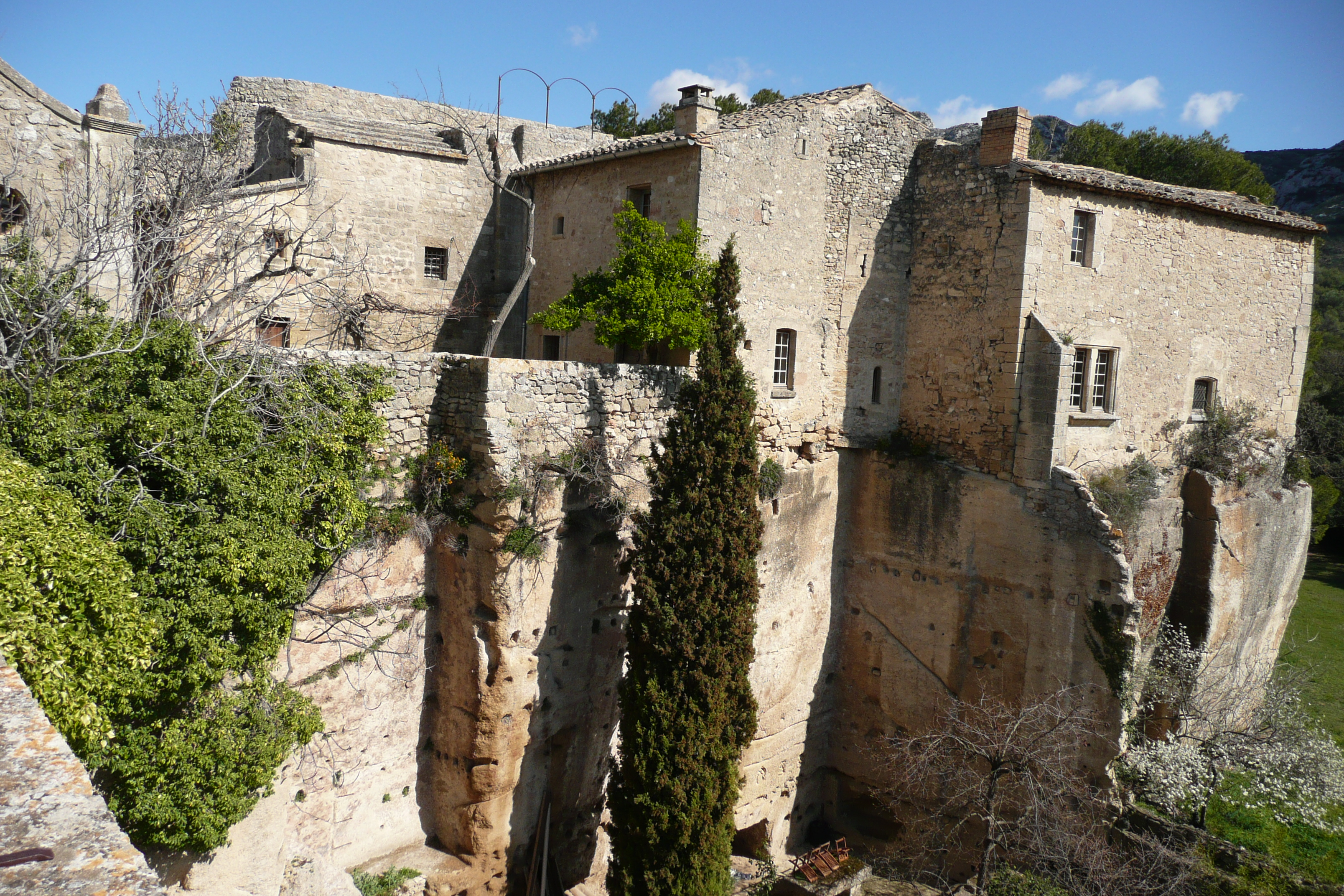 Vue sur Taillades.